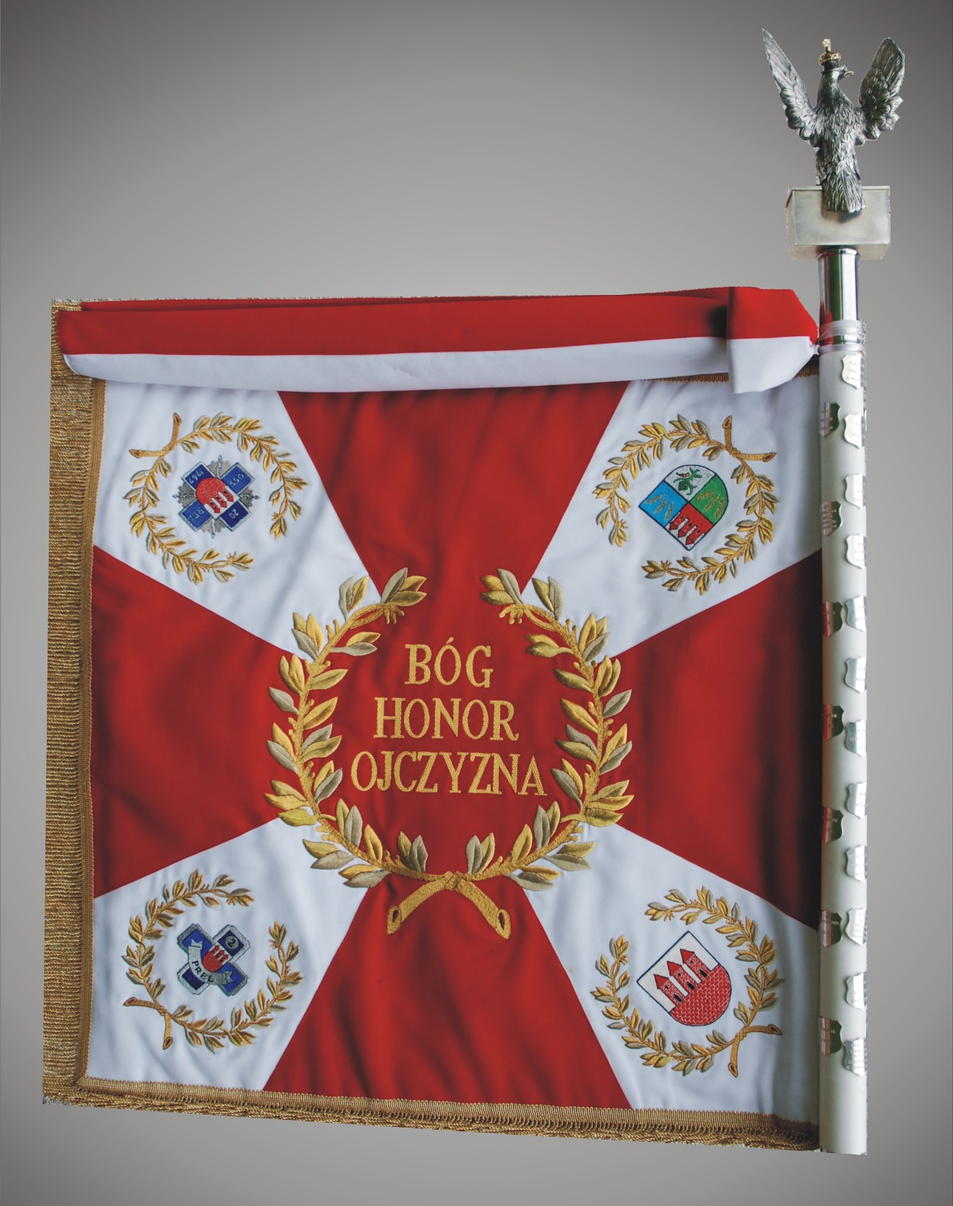 Przasnysz 2007, sala tradycji - sztandar 2 ORel